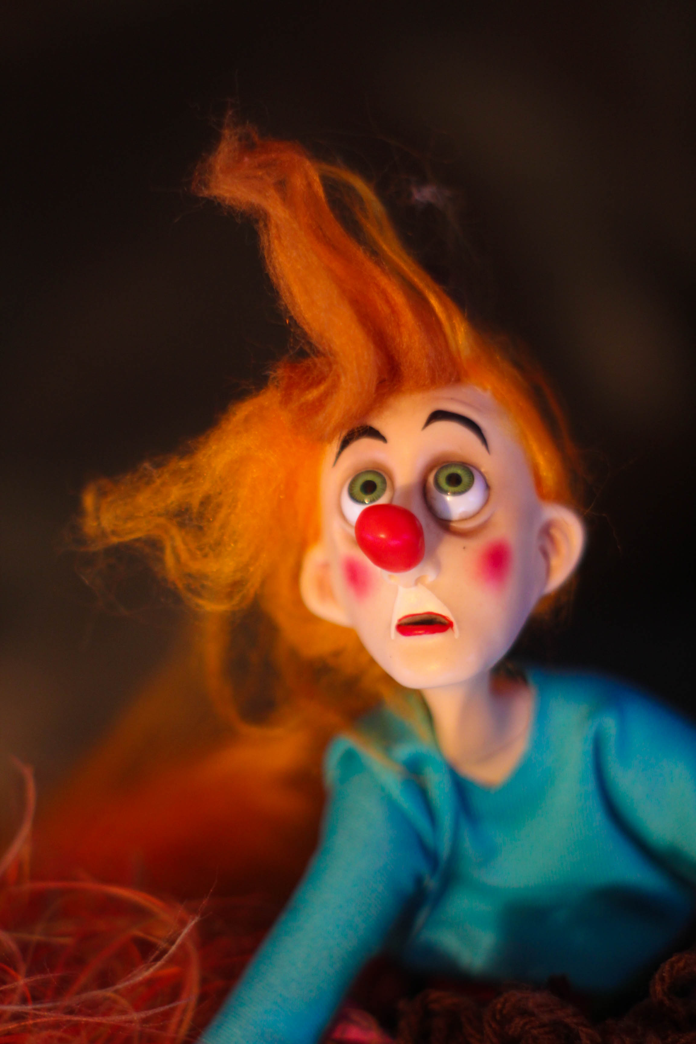 Boneco representado um palhaço